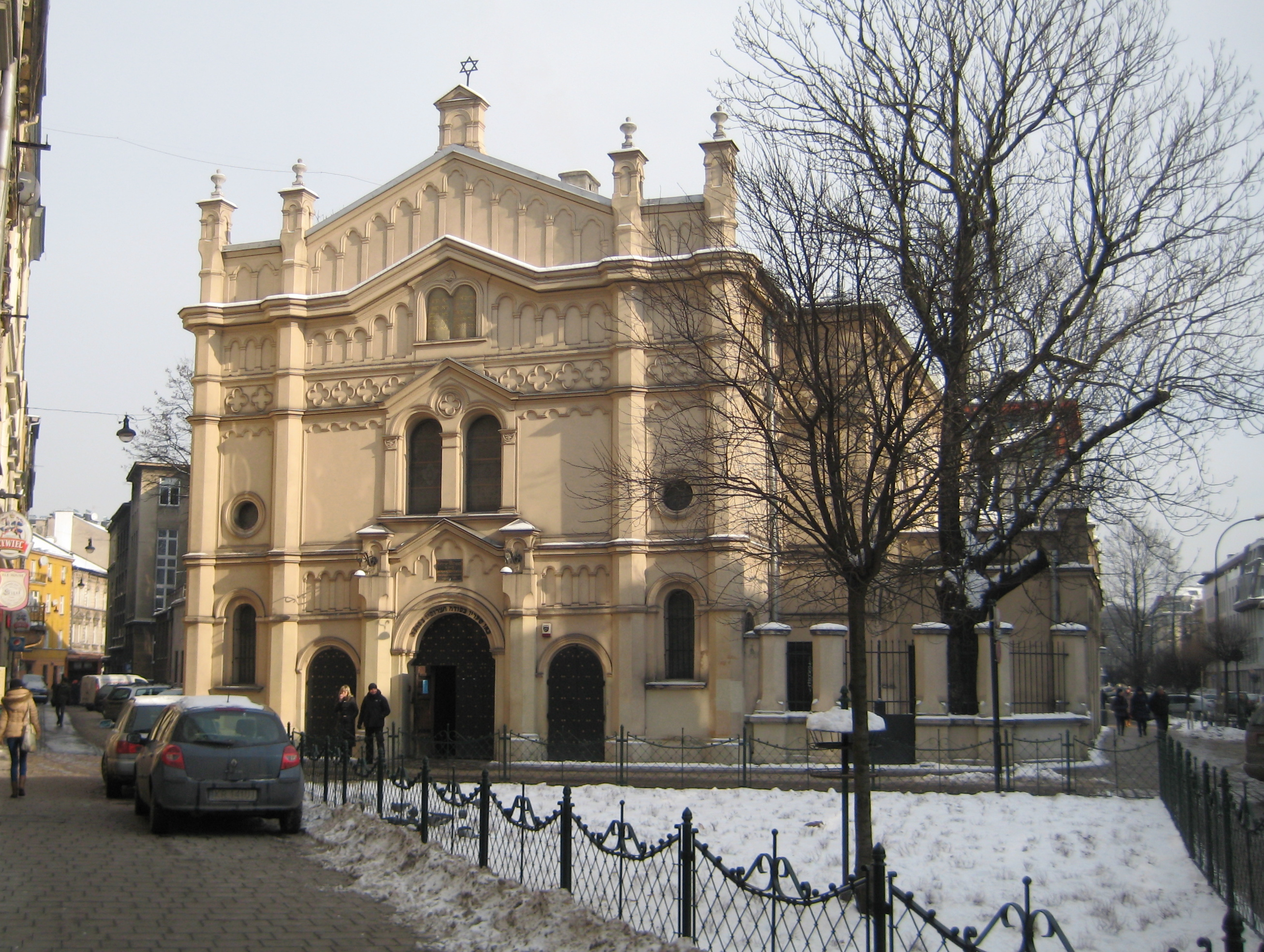 Sinagoga Tempel di Cracovia